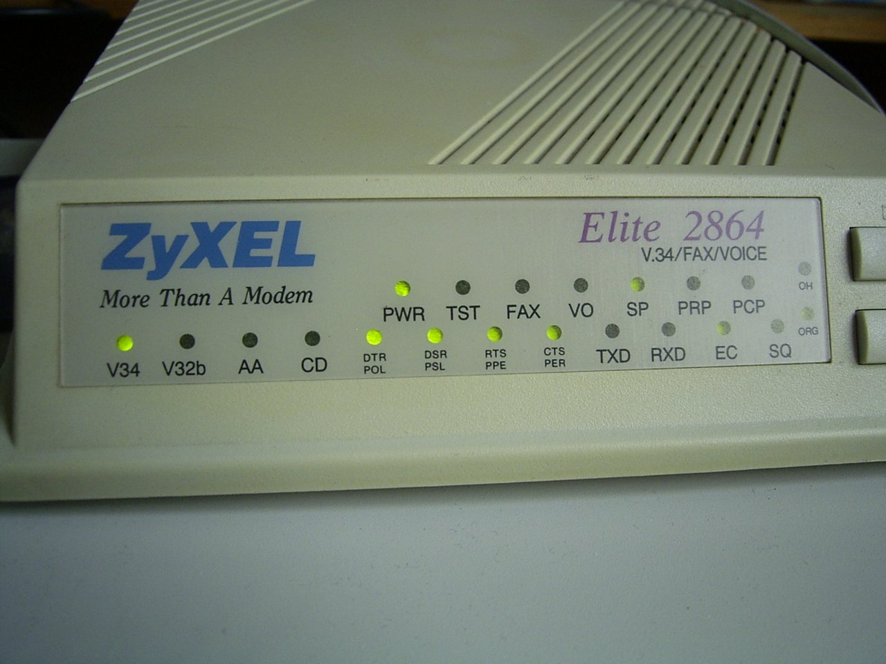 Un modem Zyxel Elite 2864 en gros plan